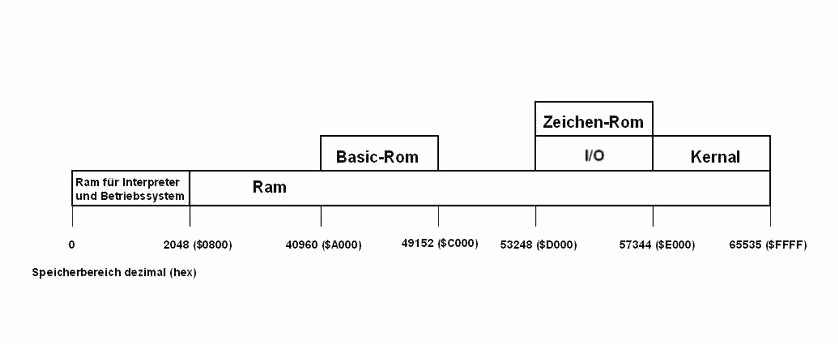 Speicherbelegung Commodore 64